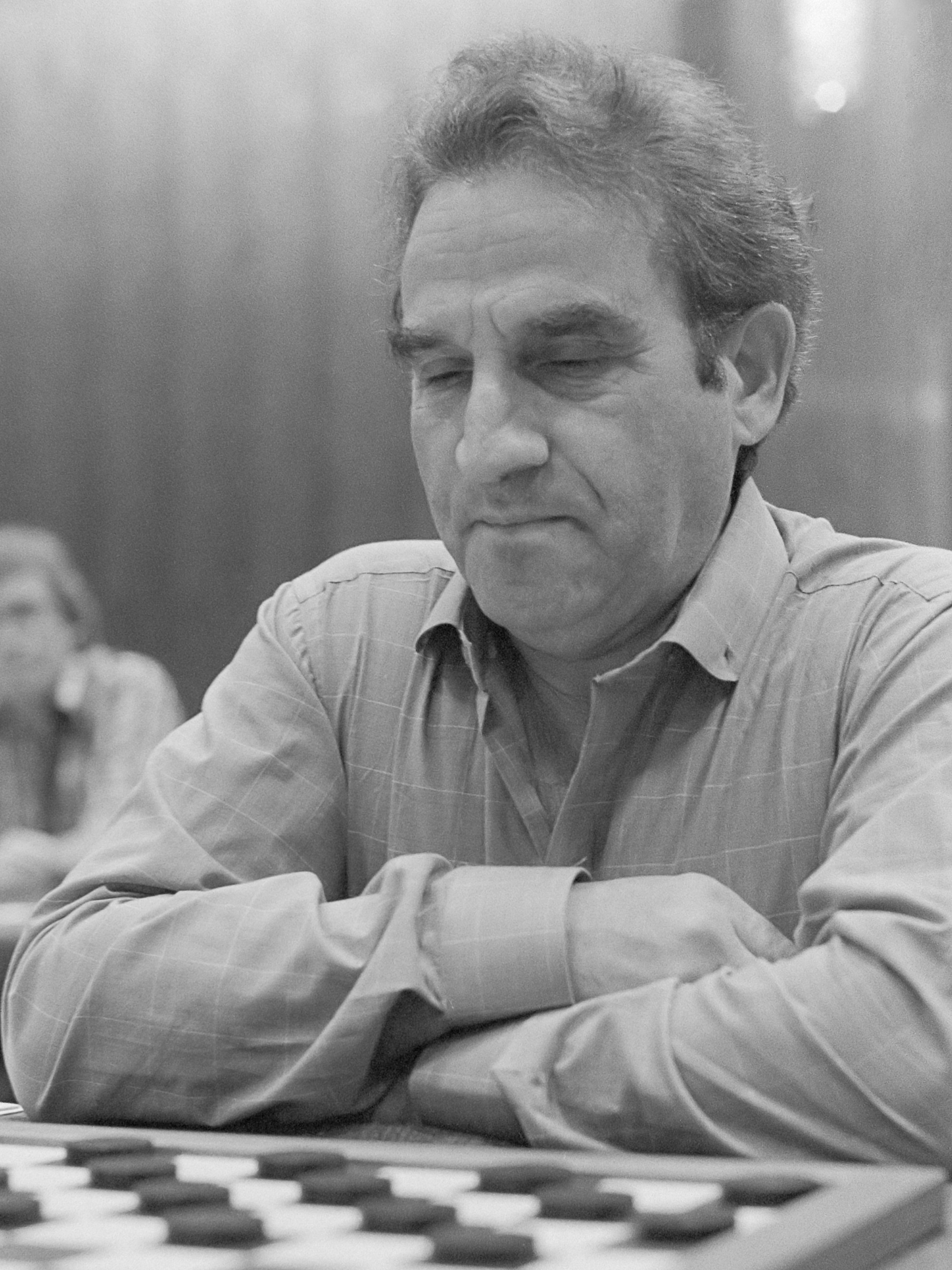 Dam-achtkamp in Amsterdam. Wladimir Kaplan (VS) 14 juli 1983